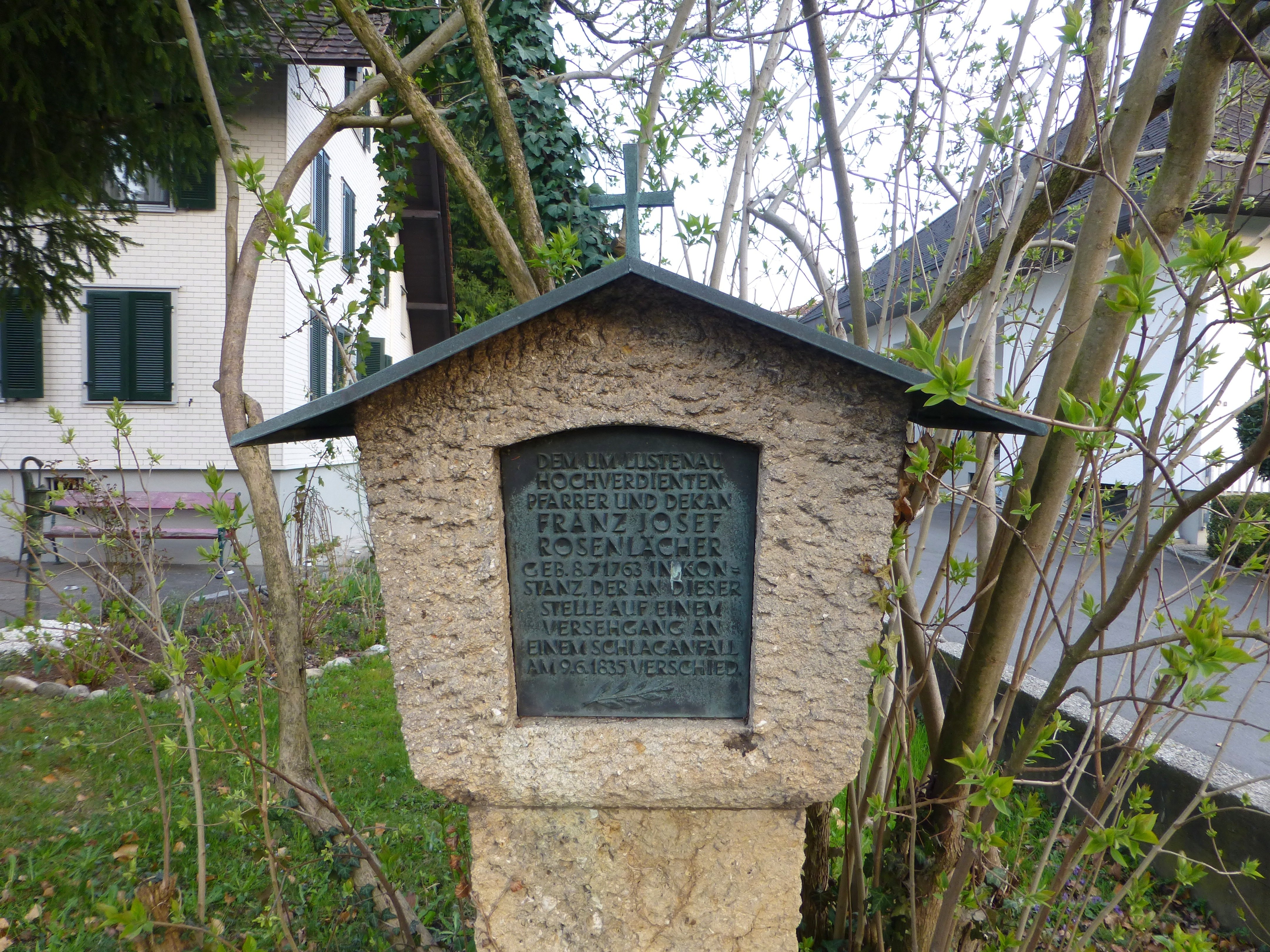 Der Bildstock zur Erinnerung an Pfarrer und Dekan Franz Josef Rosenlächer, der 1801 bis 1835 Pfarrer in Lustenau war